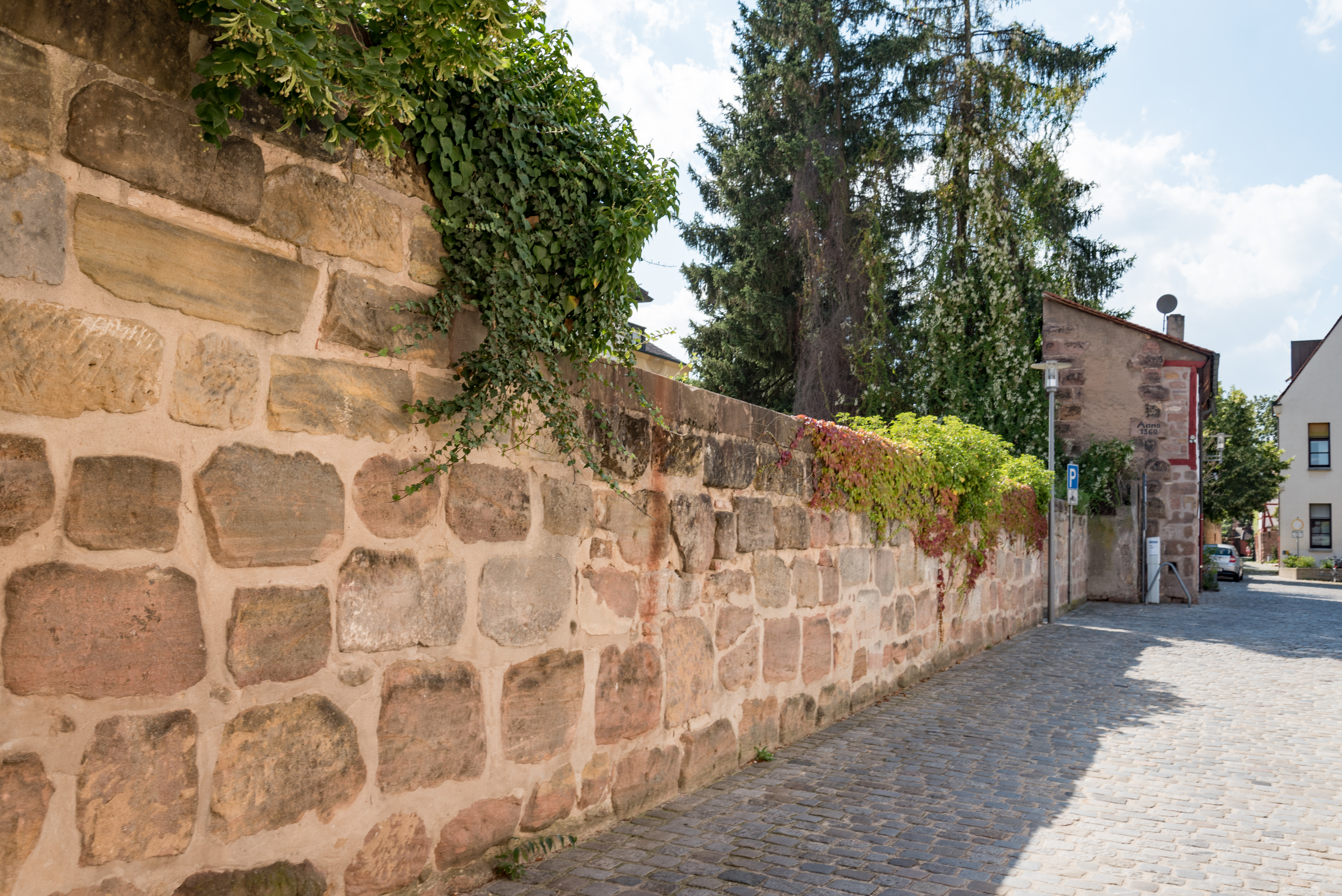 Schwabach, Stadtbefestigung, Südliche Mauerstraße 3